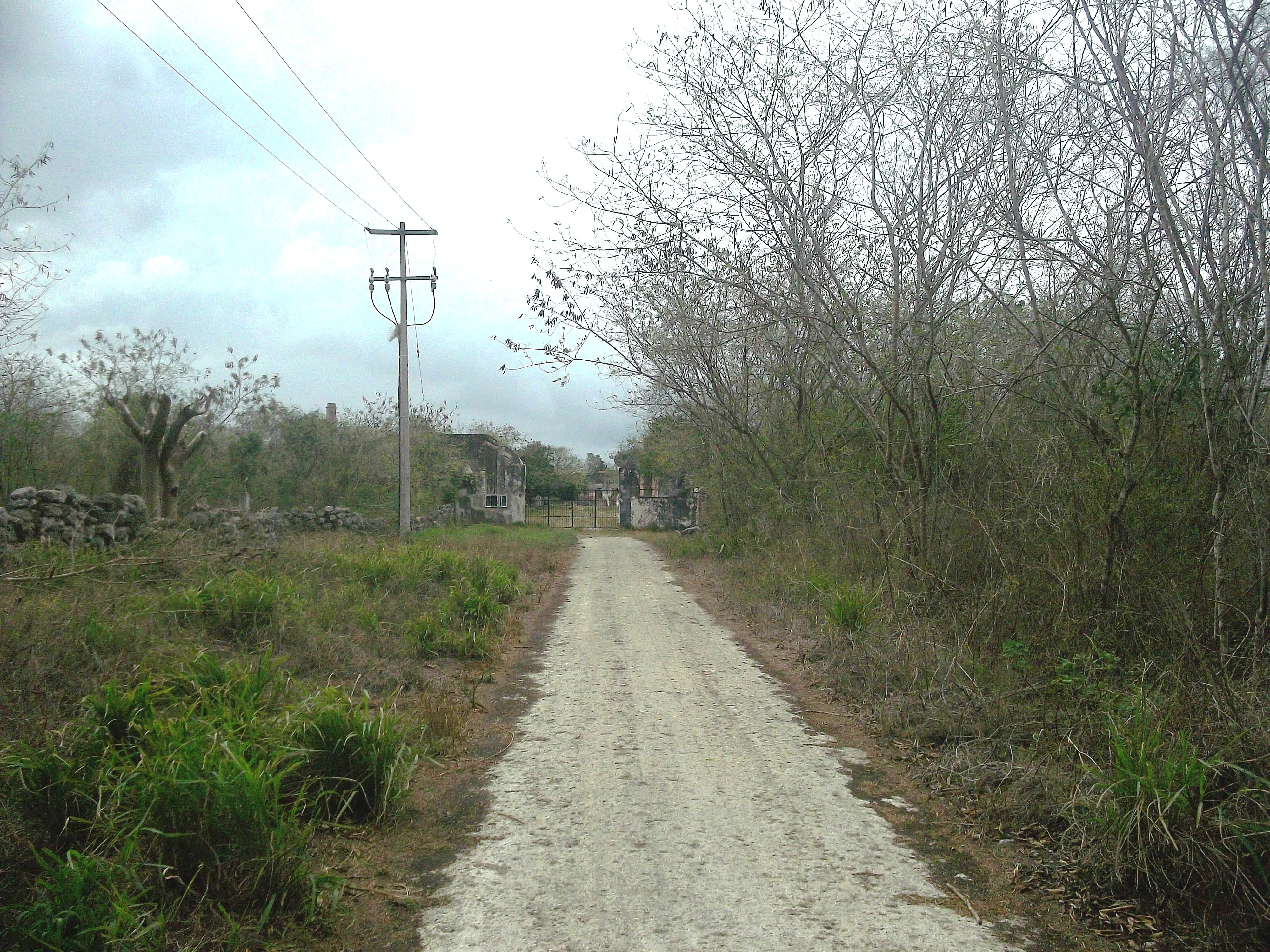 Entrada a la hacienda San Antonio Ayín, Yucatán.